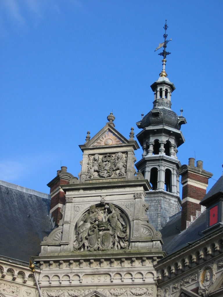 Foto door Fruggo, 28 augustus 2004, CC-BY. Detail van een van de gebouwen van de Universiteit Utrecht.